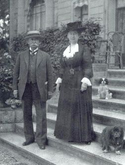 Edward Tuck et Julia Stell